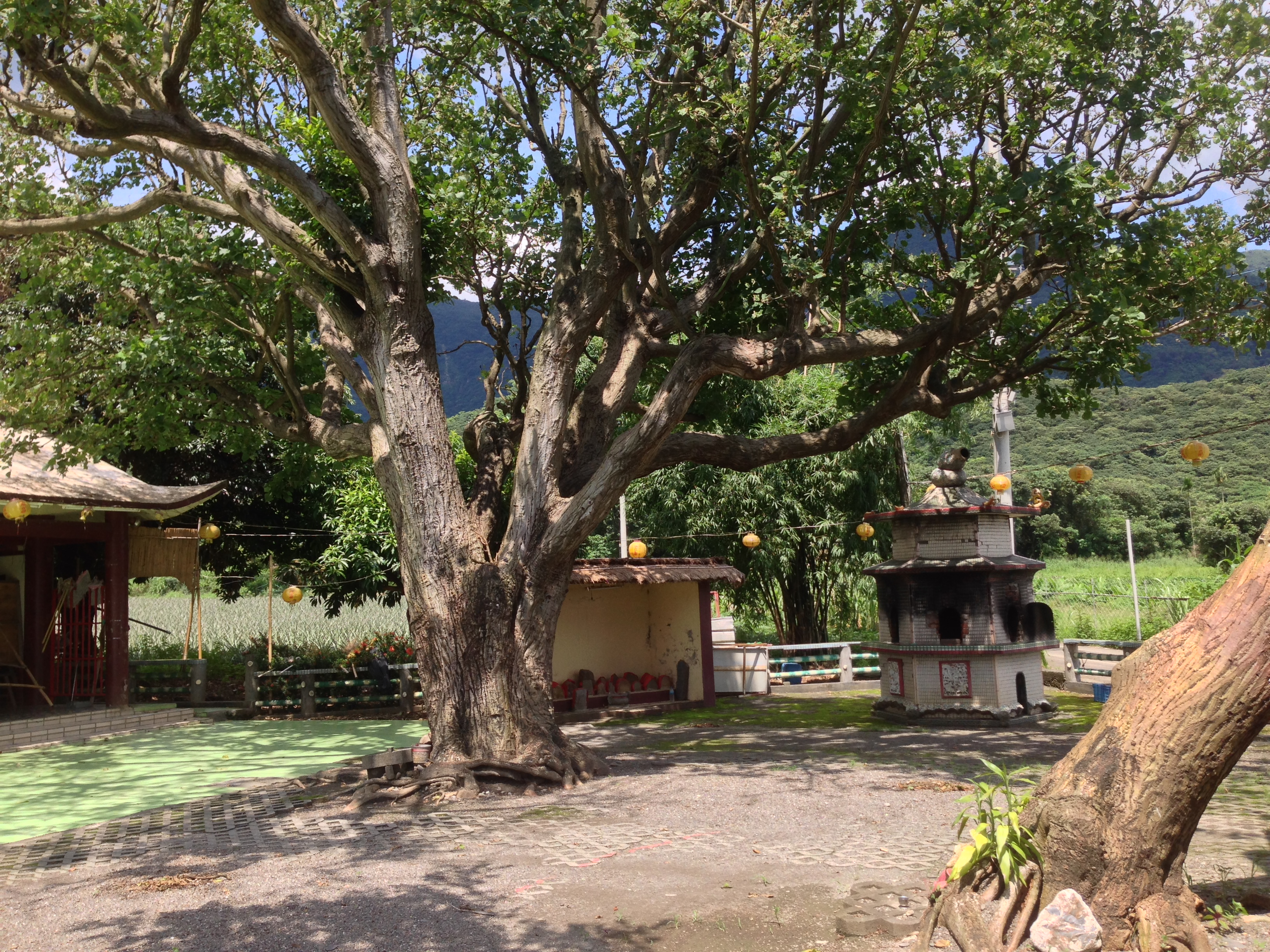 中埔公廨廟刺桐